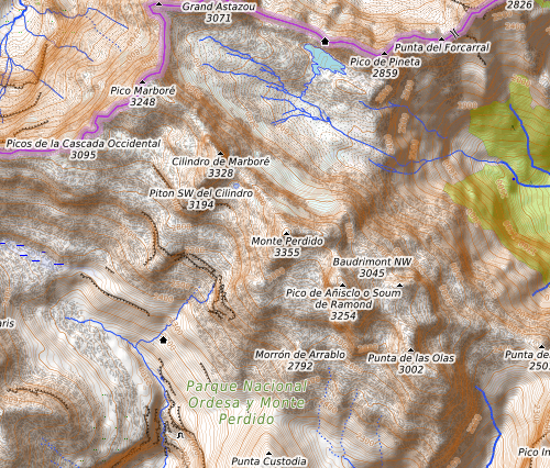 carte réalisée sur umap This map may be incomplete, and may contain errors. Don't rely solely on it for navigation.